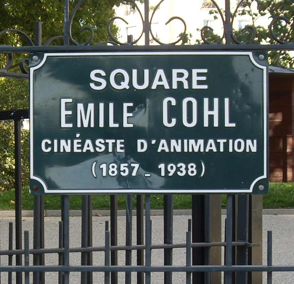 Square Émile-Cohl, Paris 12e. « Émile Cohl, cinéaste d'animation (1857-1938). »